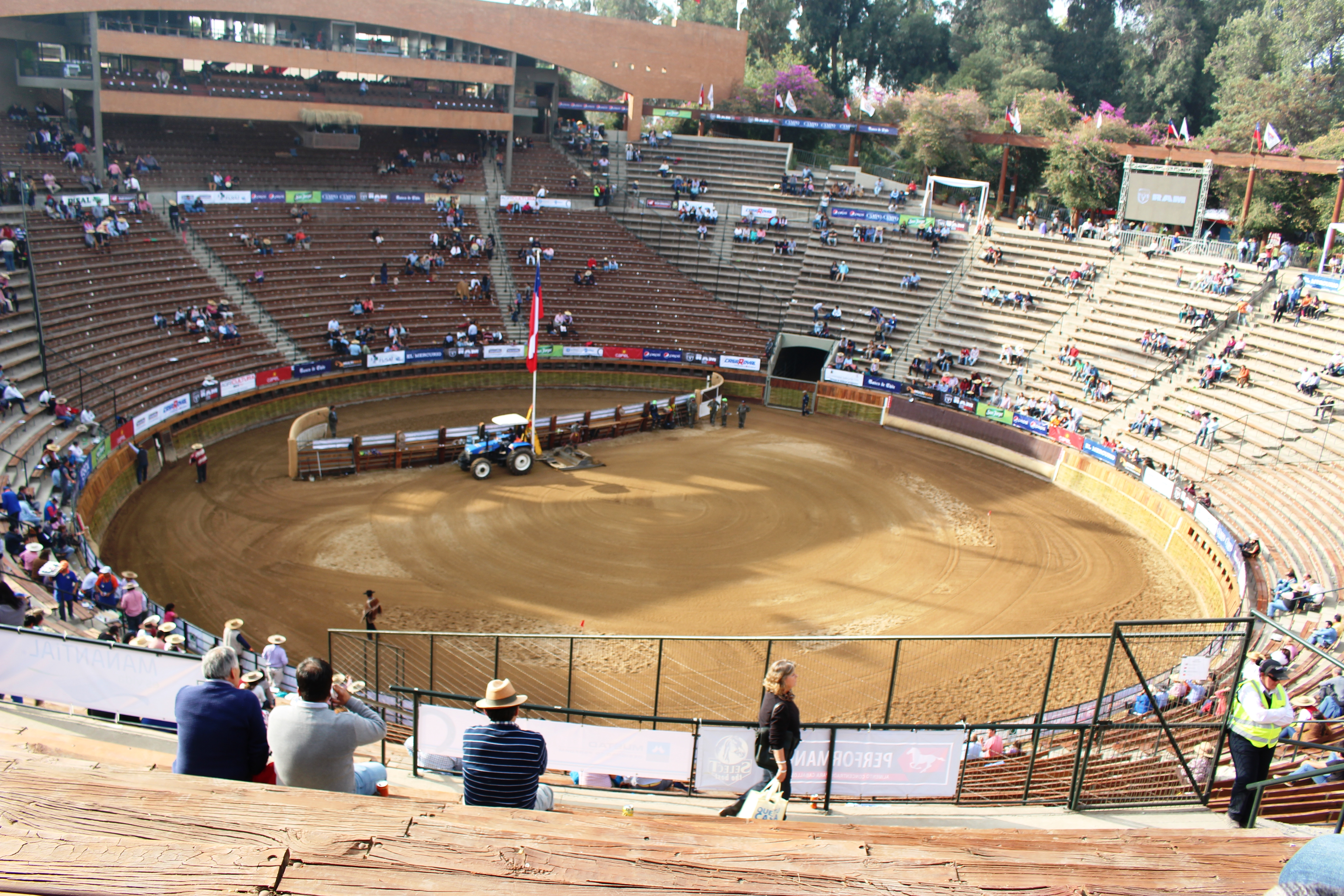 Media Luna Monumental en Rancagua, en el Campeonato Nacional de Rodeo 2016